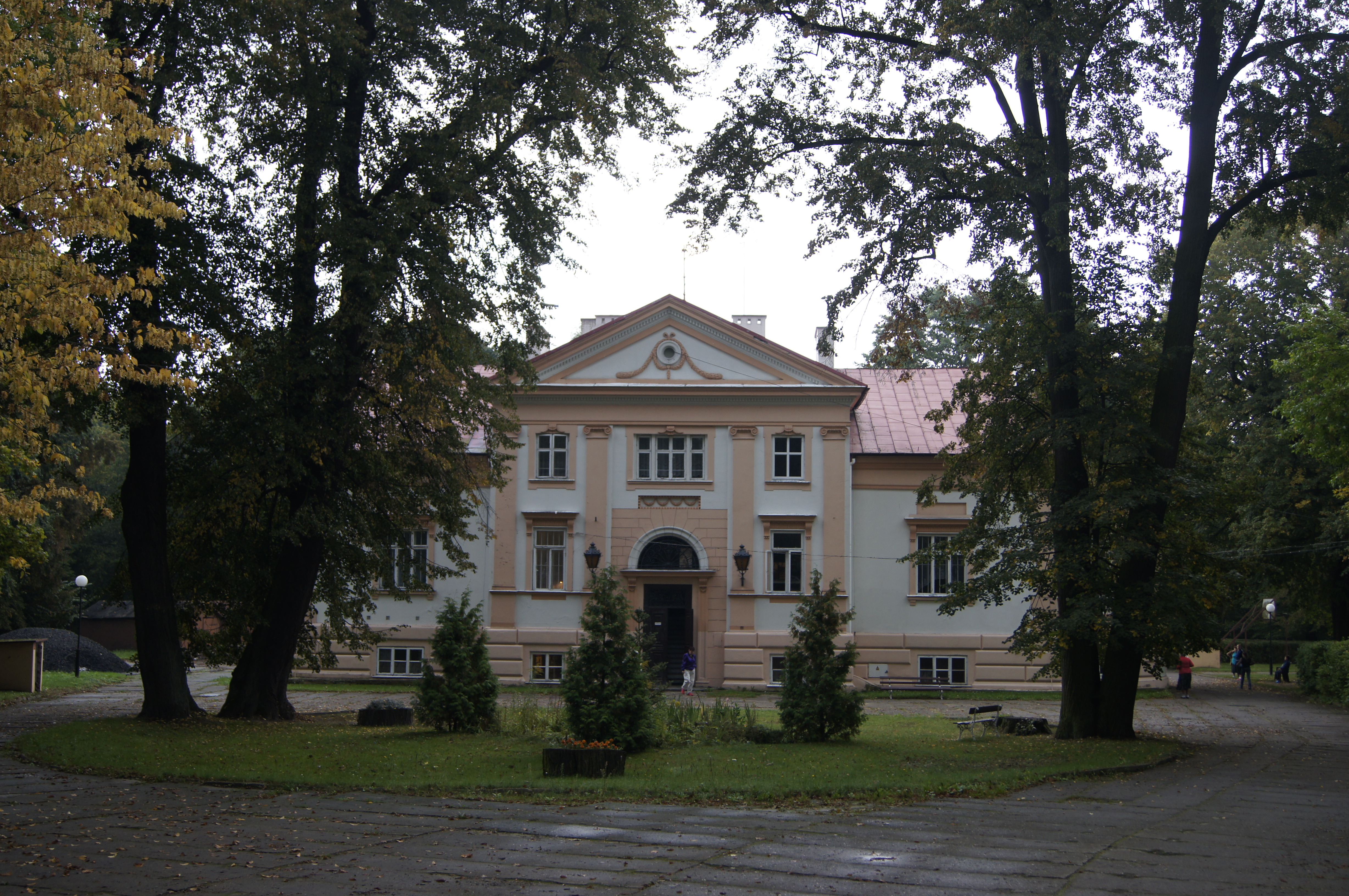 Lisowice, park dworski, kon. XVIII, XIX